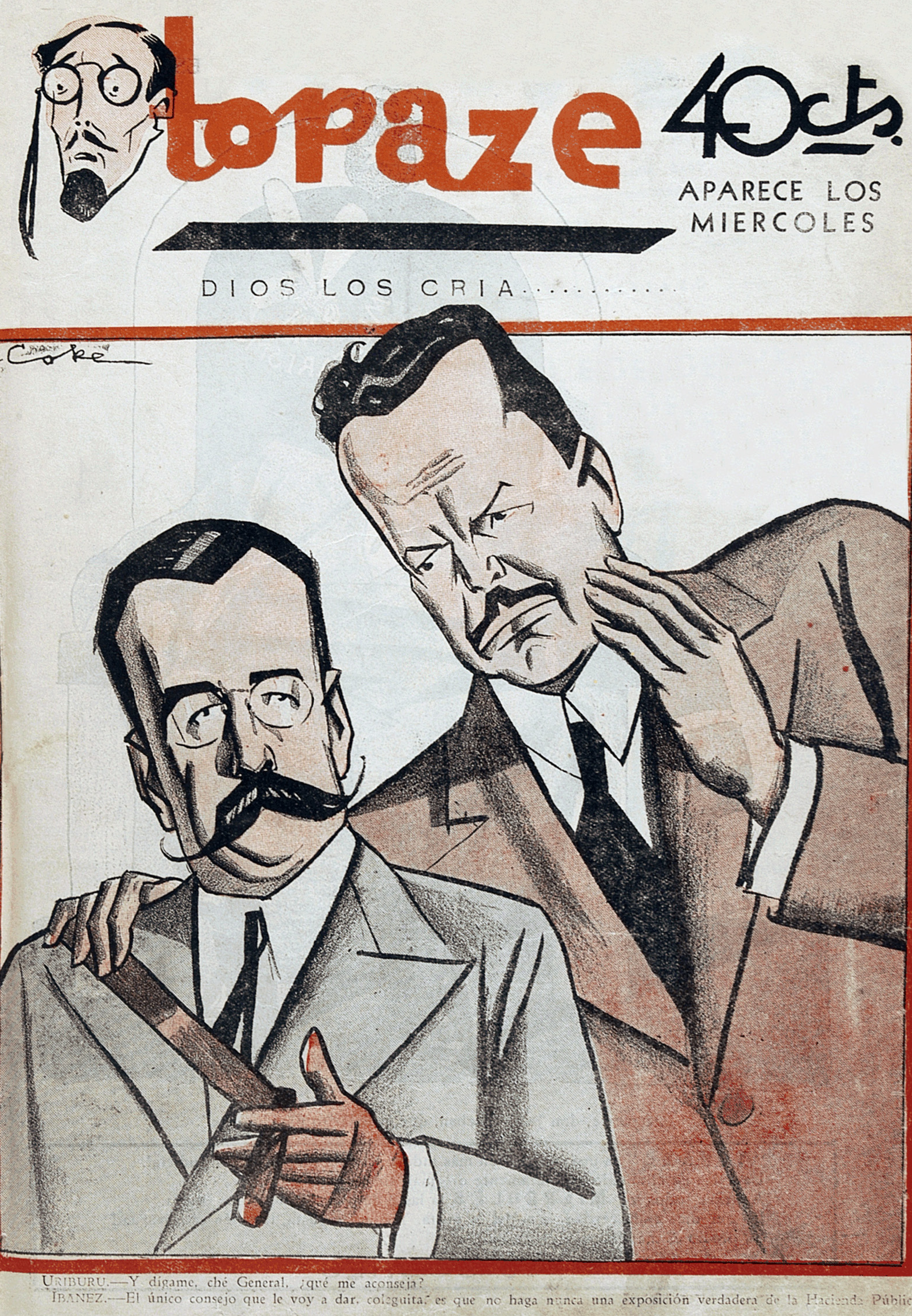 Es una revista de Sátira Política Chilena que se publicó desde 1931 hasta 1970